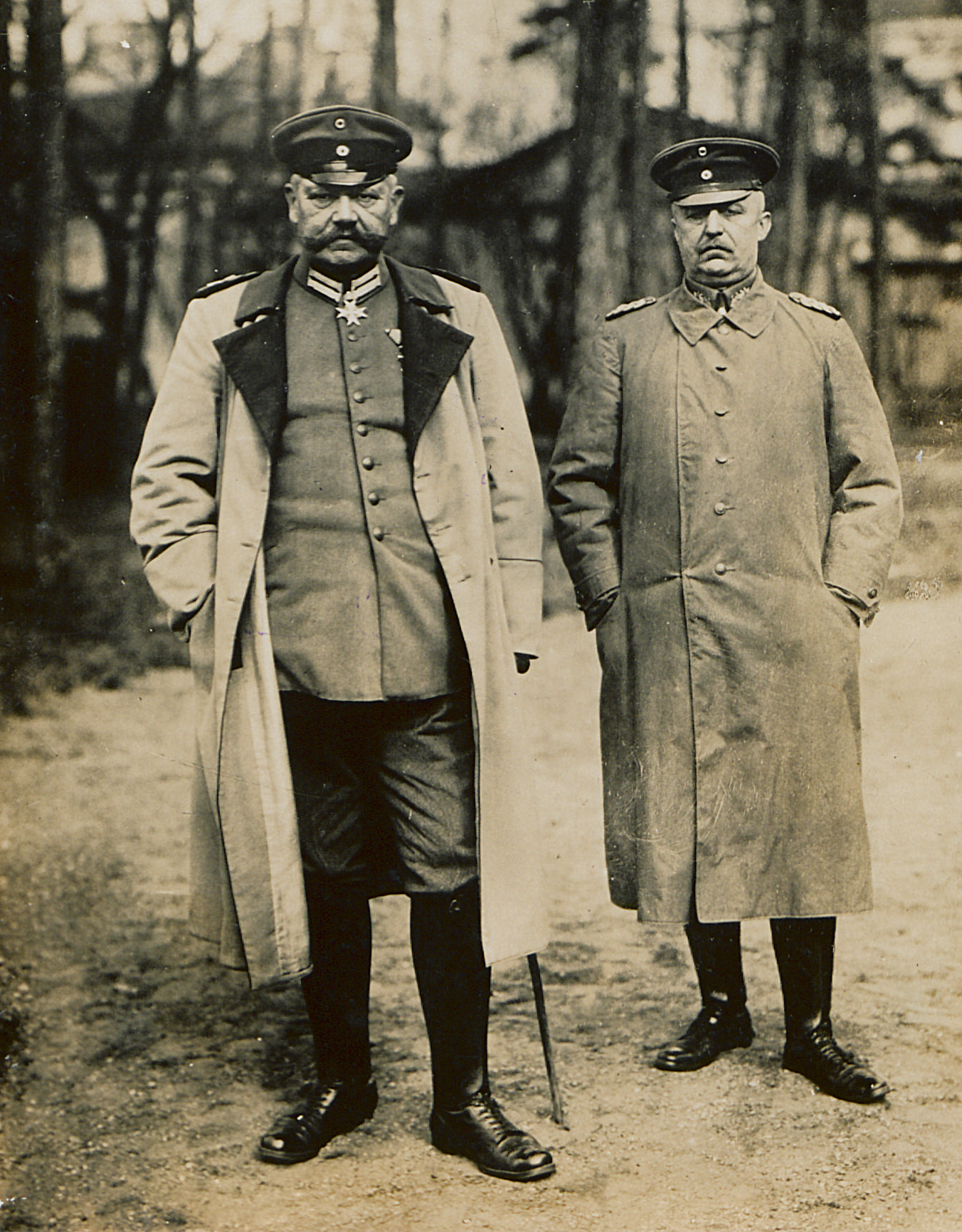 Generalfeldmarschall von Hindenburg und General Ludendorff